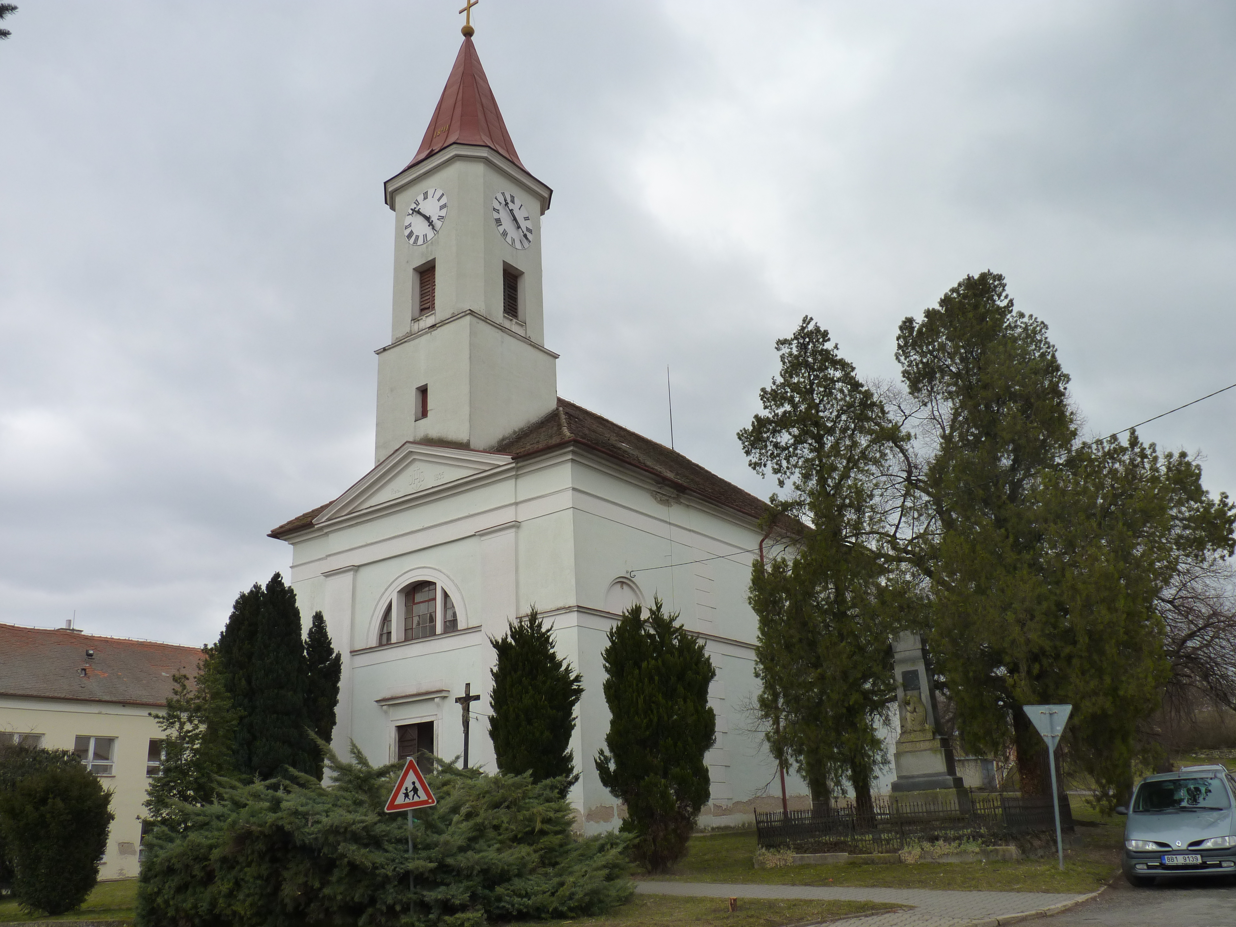 Kostel sv. Václava (Troskotovice), náves, Troskotovice